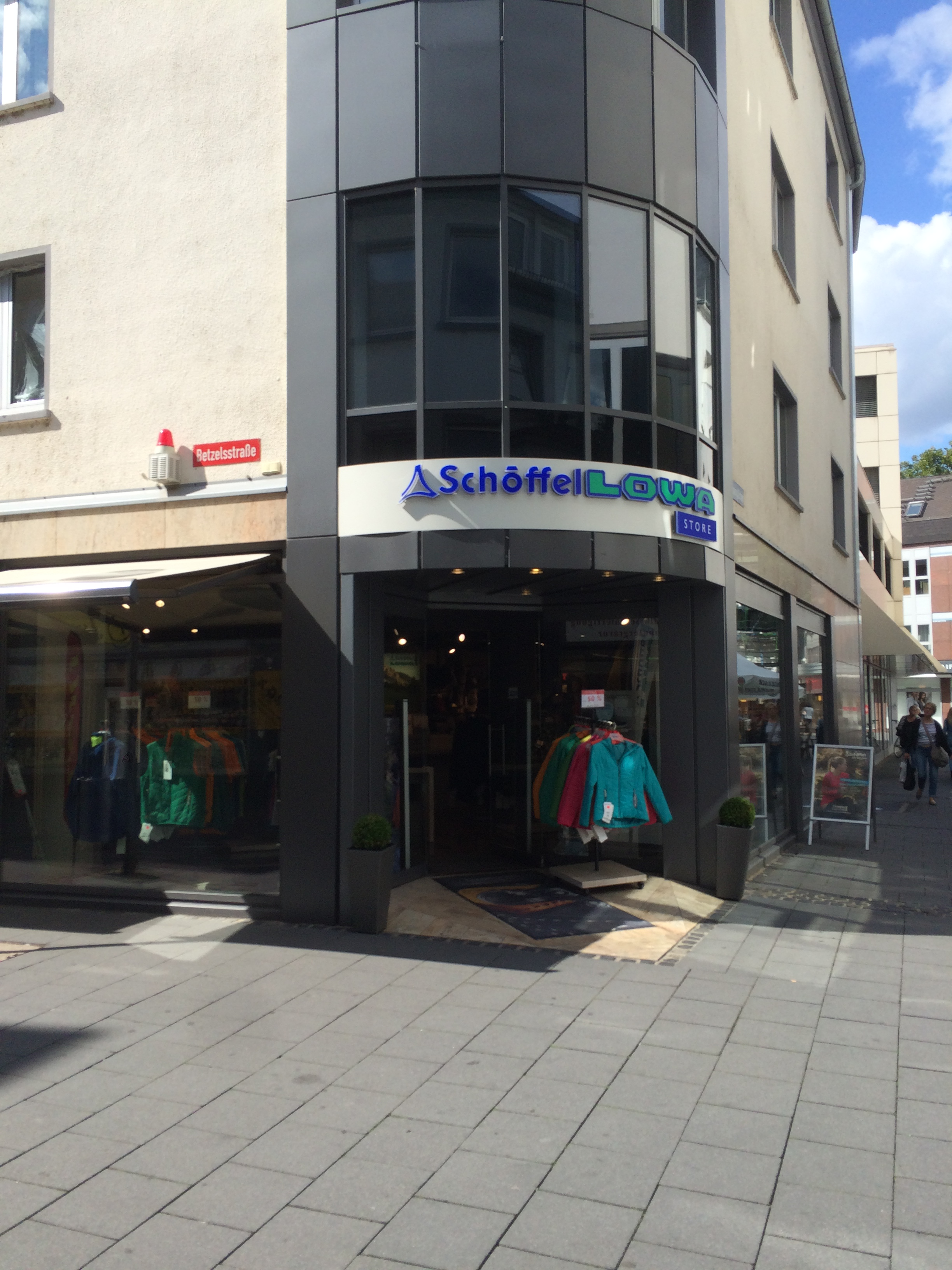 Schöffel Lowa Shop